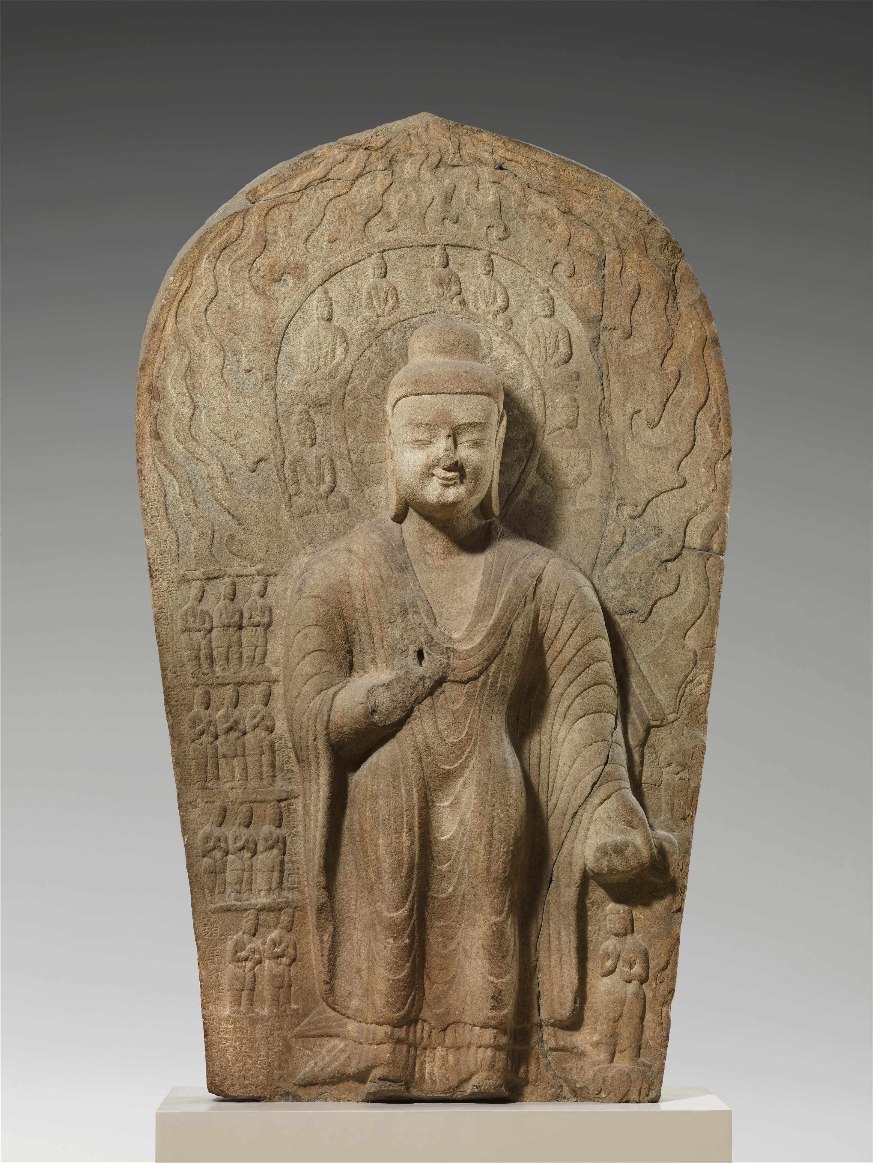 China; Stele; Sculpture